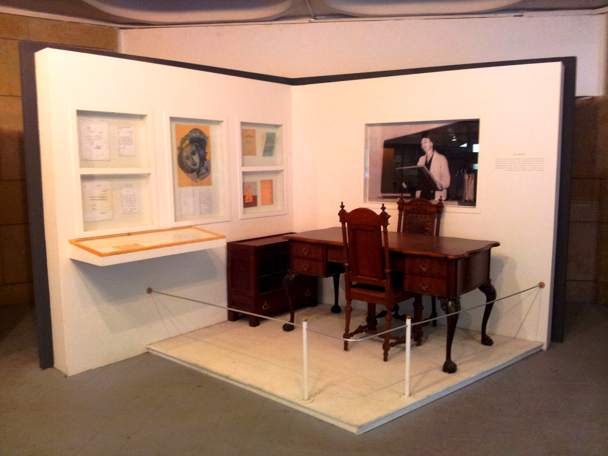 פריטים מחדר העבודה של לאה גולדברג, בתערוכת קבע בקמפוס הר הצופים של האוניברסיטה העברית בירושלים